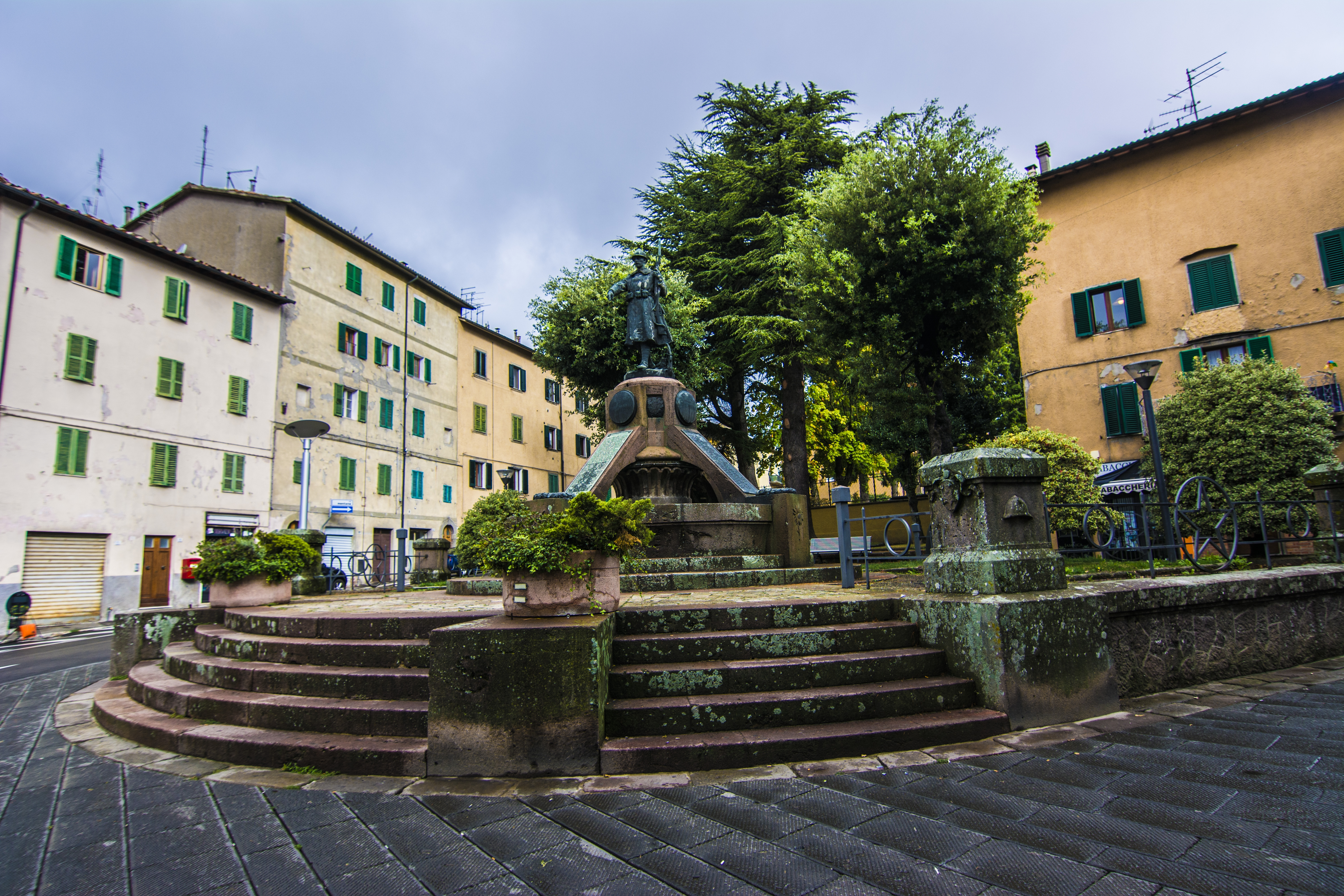 Monumento ai Caduti in guerra This is a photo of a monument which is part of cultural heritage of Italy.